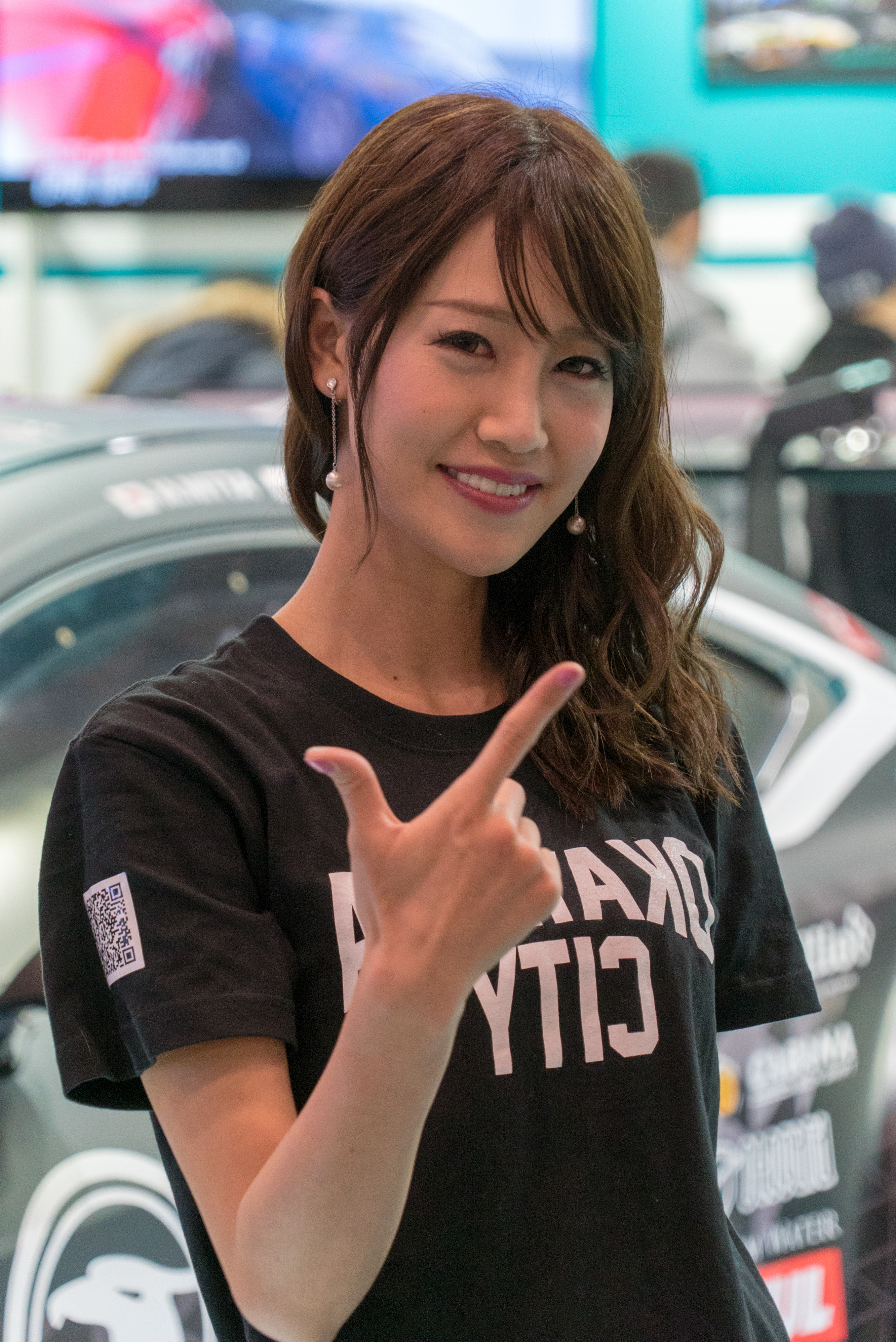 TOKYO AUTO SALON 2018-20.jpg